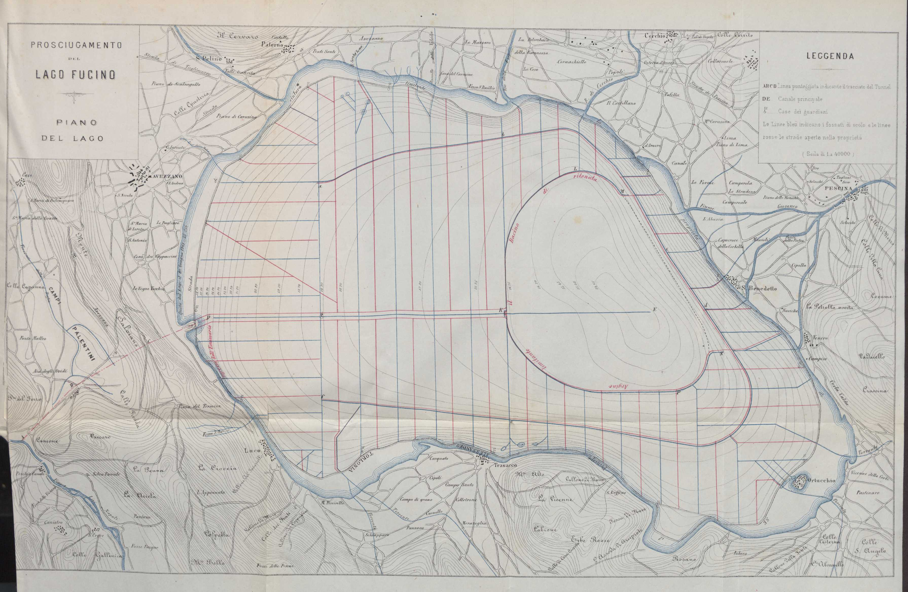 Lago Fucino. Tratto da Cenni riassuntivi dei progetti e delle opere intraprese pel prosciugamento e definitivo bonificamento del Lago Fucino e considerazioni su queste ultime